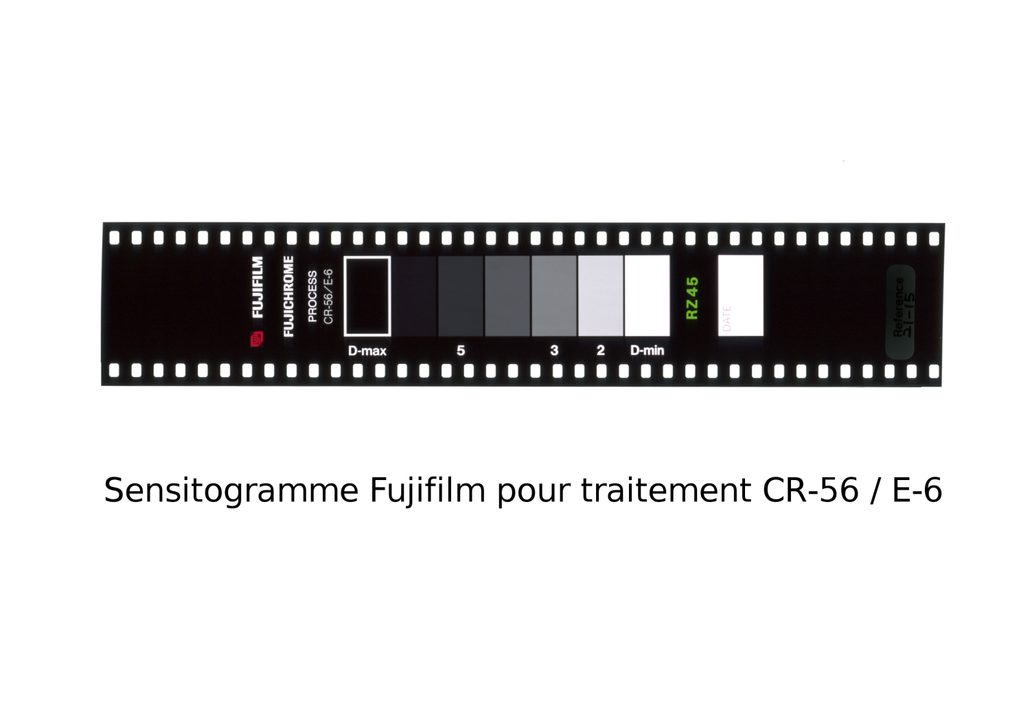 Sensitogramme Fujifilm pour traitement CR-56 / E-6